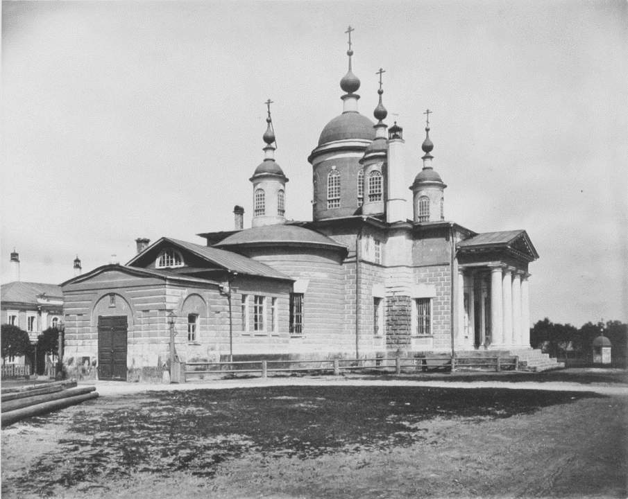 Единоверческая церковь Введения во храм Пресвятой Богородицы Введенской единоверческой общины в Лефортове.